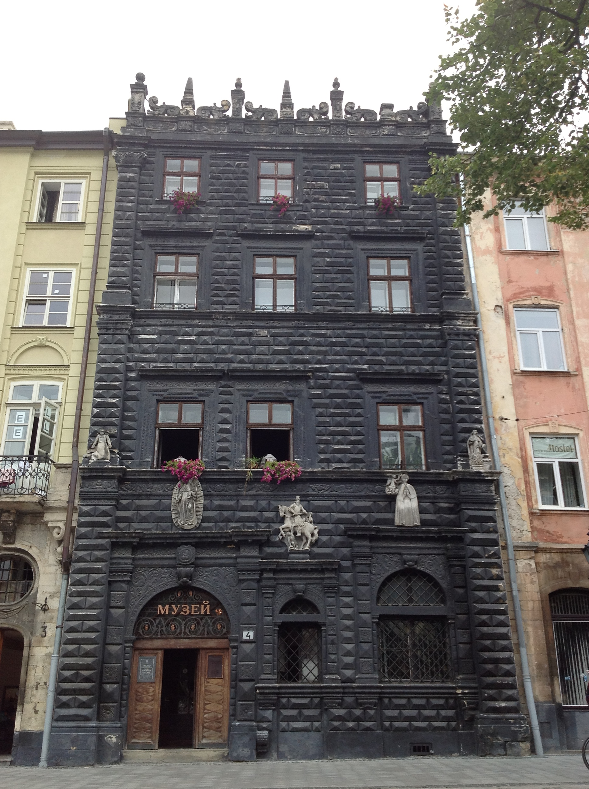 Львів. Площа Ринок. Чорна кам'яниця (XVI - XVII ст., архітектор Петро Красовський (?), реконструйовано у 1884 р.). Зараз у будинку міститься Львівський історичний музей.